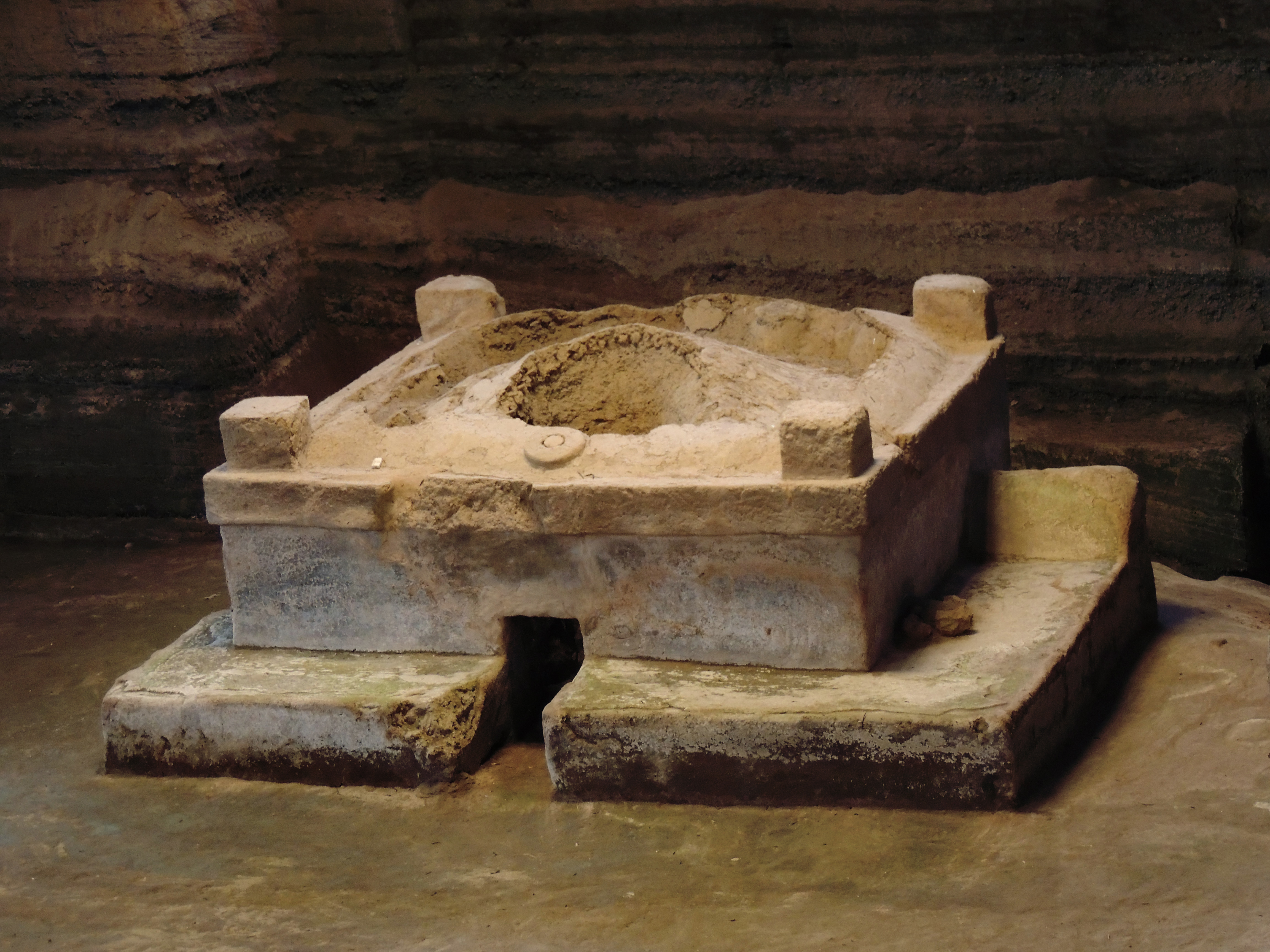 Vista del Tamazcal en el Sitio de Joya de Ceren, San Juan Opico, La Libertad